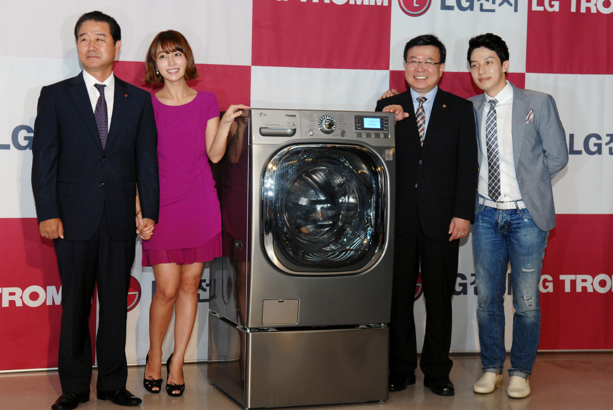 LG전자는 19일 대한사회복지회에 1천만원 상당의 SNS 기부이벤트 모금액을 전액 기부하고 국내 최대 19kg 용량 LG ‘트롬 6모션’ 드럼세탁기를 기증했다. 기부금 및 기증품은 국내외 미혼모 시설, 공동생활가정 등 대한사회복지회가 운영하는 다양한 미혼모 지원 사업에 활용된다. ※ LG전자 뉴스룸 에서 관련 보도자료를 확인실 수 있습니다.